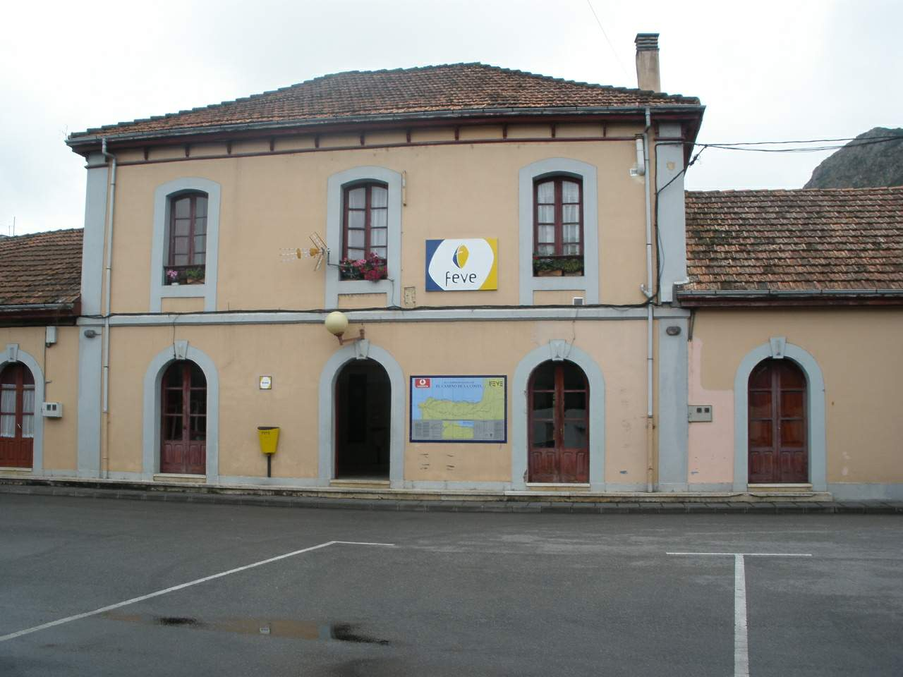 Estación de tren de Arriondas (Parres, Asturias)